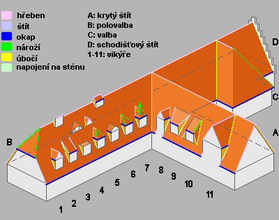 Schématický popis částí střechy